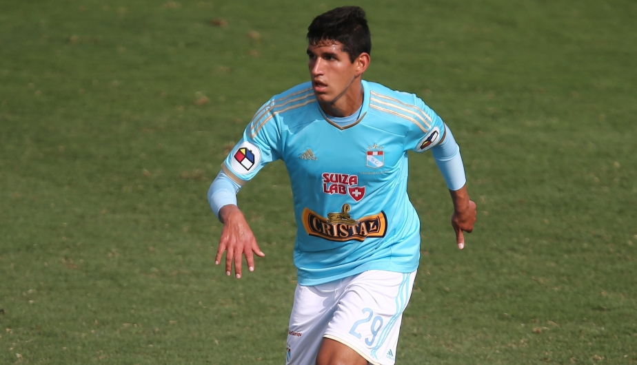 En su club, Sporting Cristal